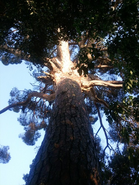 Pi Gros de can Martí (Tossa de mar, Girona)